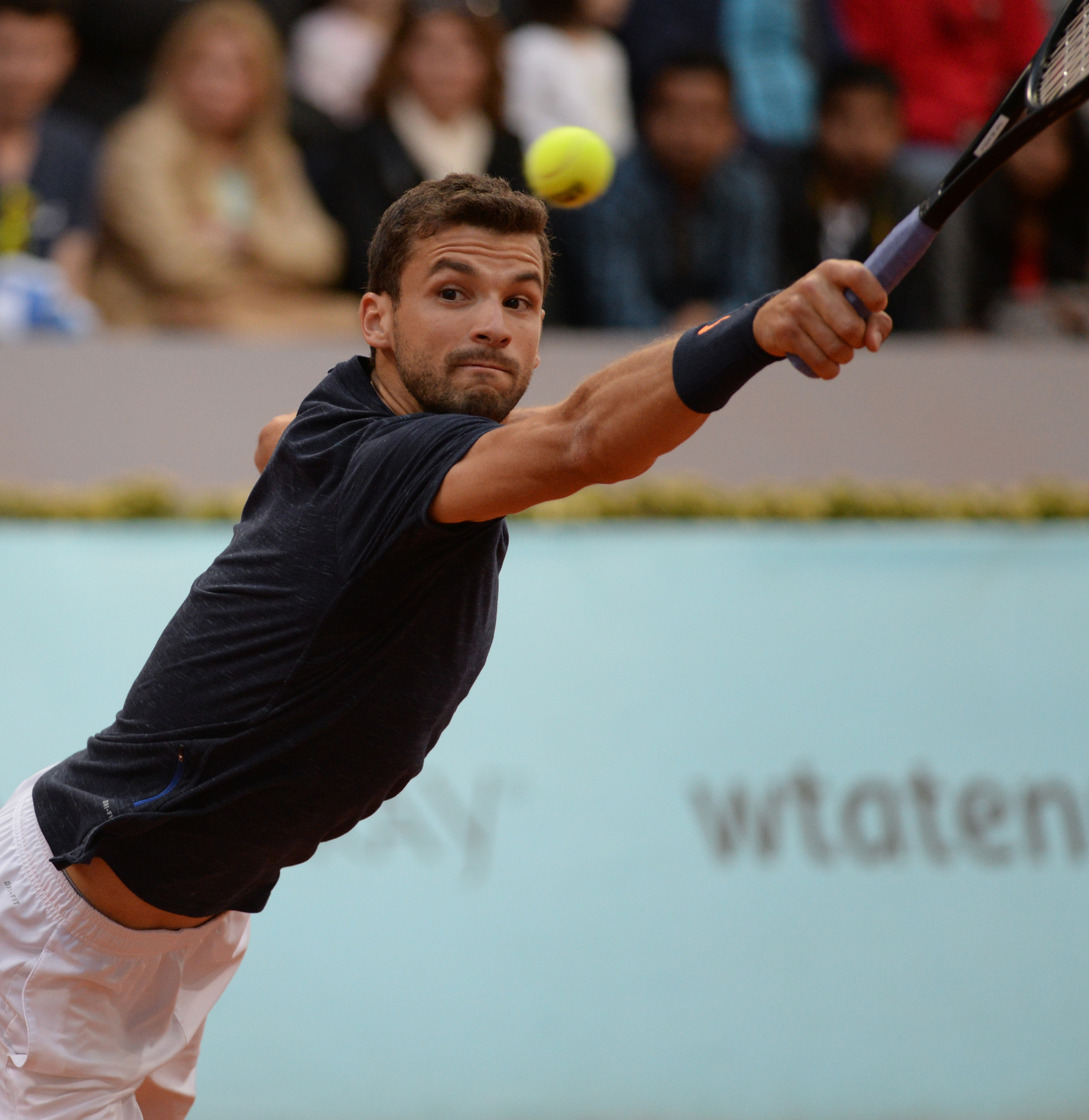 Grigor Dimitrov